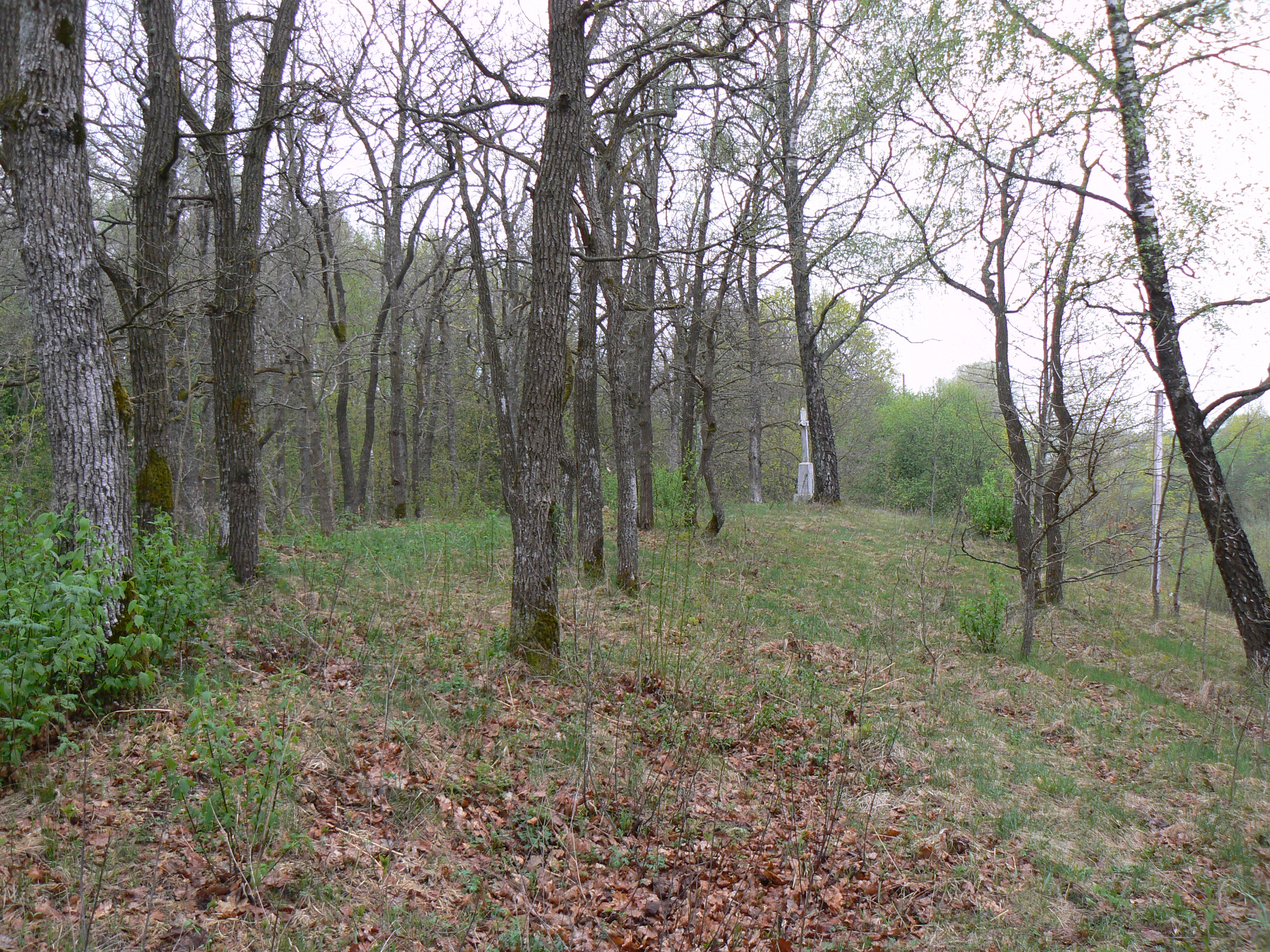 Hradiště (piliakalnis) Maciuičių piliakalnis, na západ od vsi Maciuičiai na levém (východním) břehu Minije, naproti Gargždům.